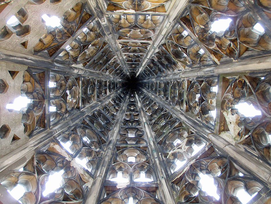 Offene Kirche St. Elisabeth, Basel. Turmhelm.